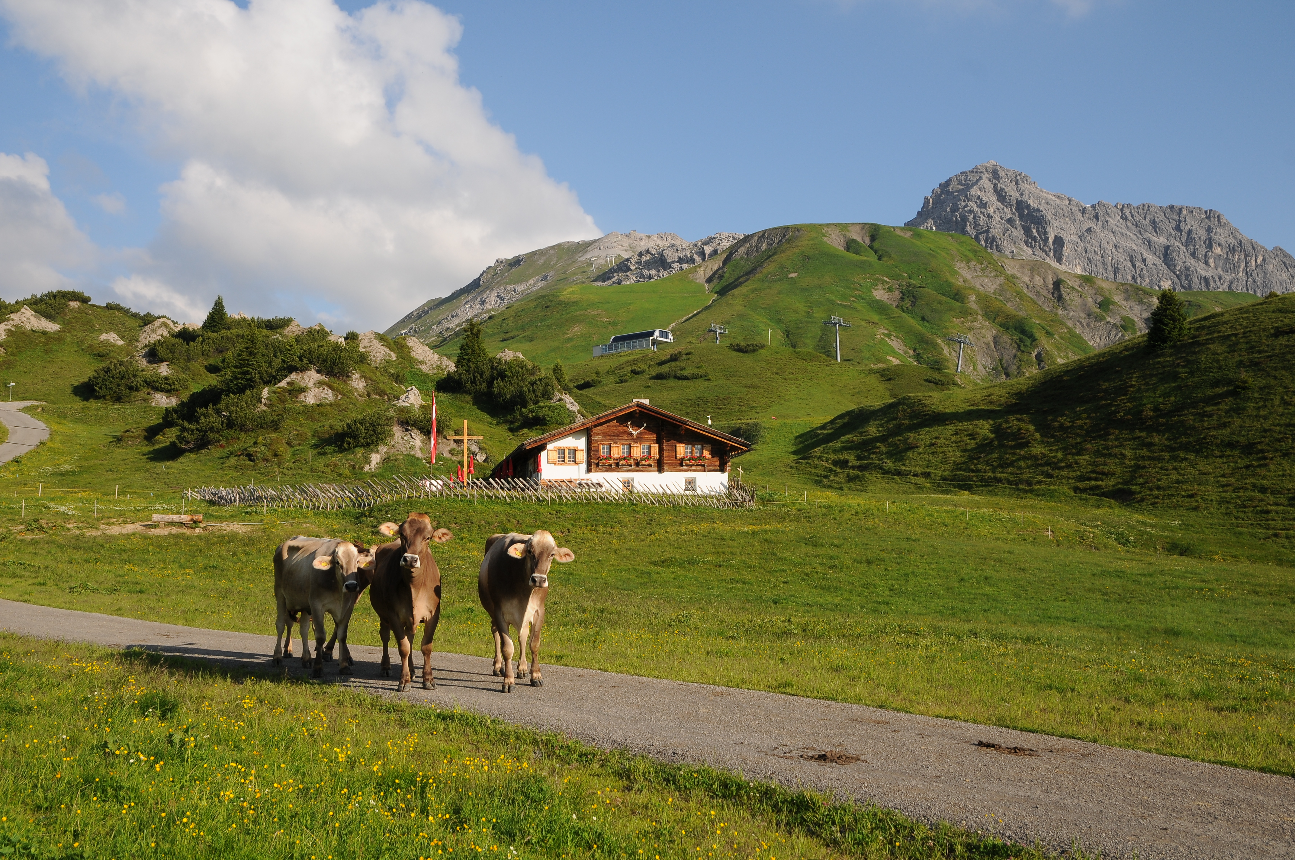 Am Fuße des Kriegerhorn liegt mitten im Naturschutzgebiet Gipslöcher die Kriegeralpe im Gemeindegebiet von Lech. Im Hintergrund links das Zuger Hochlicht und rechts der mächtige Gipfelgrat der 2.544m hohen Mohnenfluh. Sehr interessiert zeigen sich diese Mädchen über den Fotografen, der schon zeitig auf dem Weg ist.